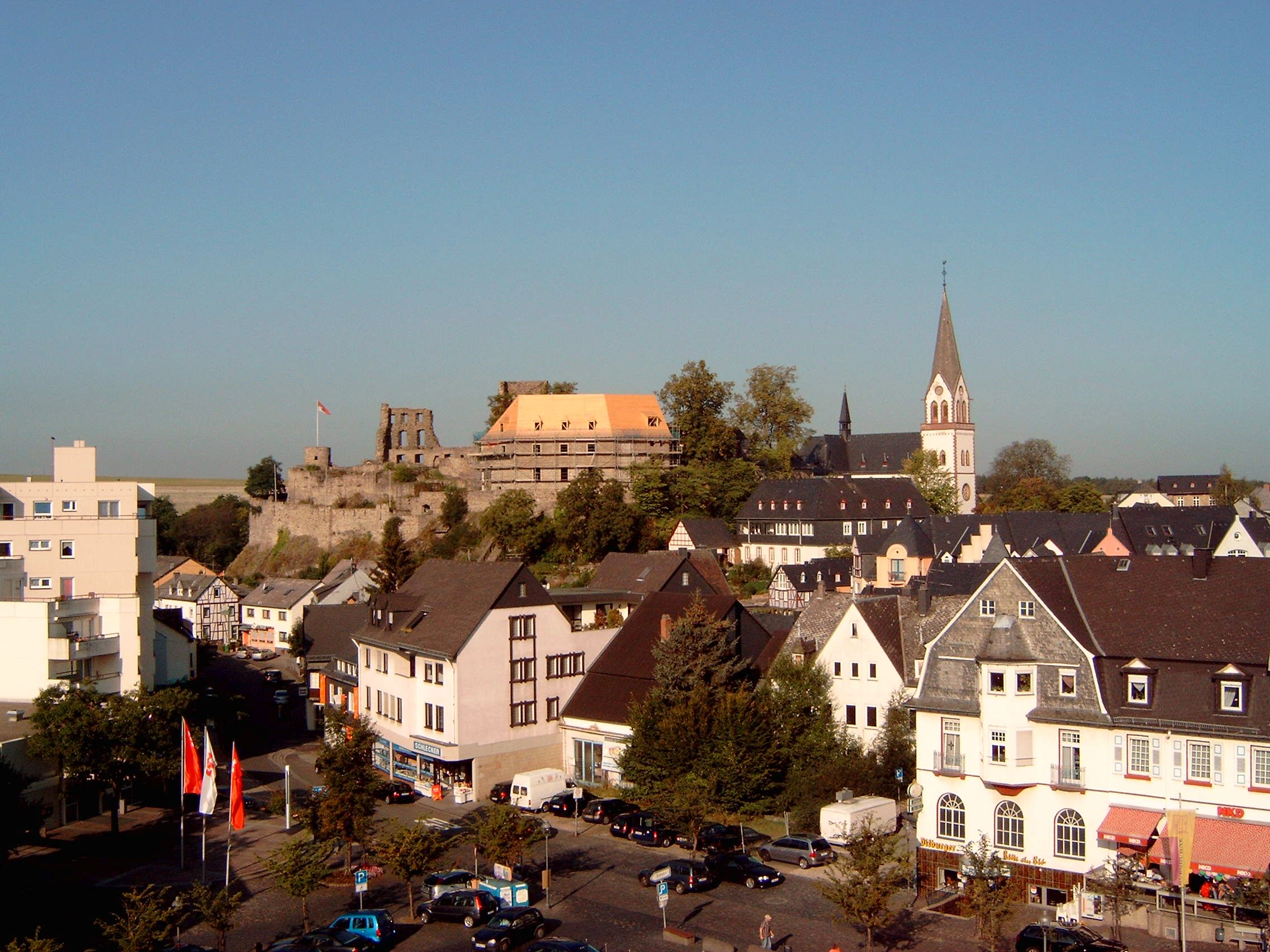 Beschreibung:Der Marktplatz, im Hintergrund die Burg der Stadt Kastellaun. Quelle: eigene Fotografie Fotograf: --Achim Berg 11:38, 12 September 2006 (UTC) Datum der Aufnahme: 12.September 2006